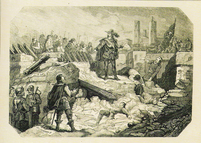 Bandera Negra en un gravat historicista, de Joaquim Furno i Abad (1832-1918) en una obra de Víctor Balaguer (1824-1901) (Arxiu Minicipal d'Història de la Ciutat de Barcelona)